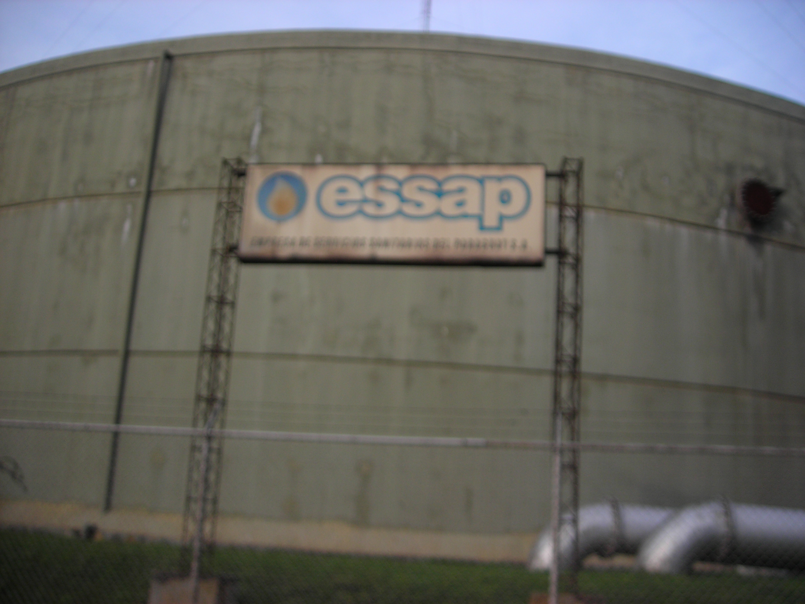 essa